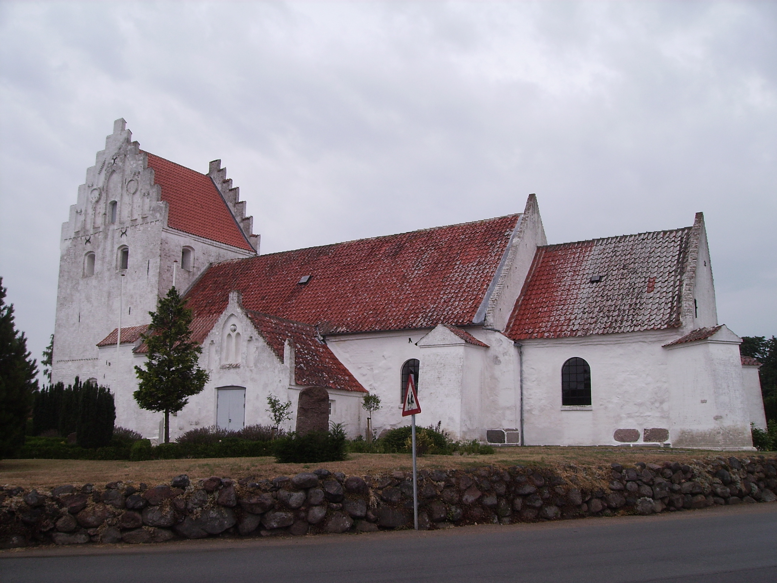 Dalby Kirke, Dalby Sogn, Bjerge Herred, Odense Amt, Denmark (Danish Church) - Dalby Kirke fra sydøst